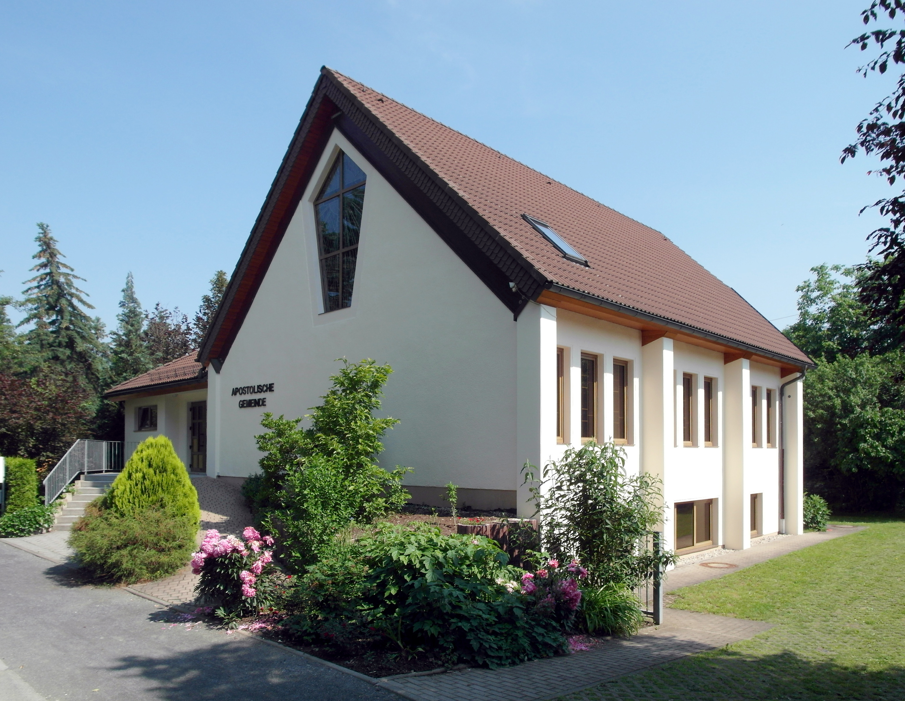 05.06.2016 01257 Dresden-Niedersedlitz: 1996 fertiggestellte Kirche der Apostolische Gemeinde Dresden, Bismarckstraße 30 (GMP: 51.001762,13.823858) [SAM6325.JPG]20160605100DR.JPG(c)Blobelt